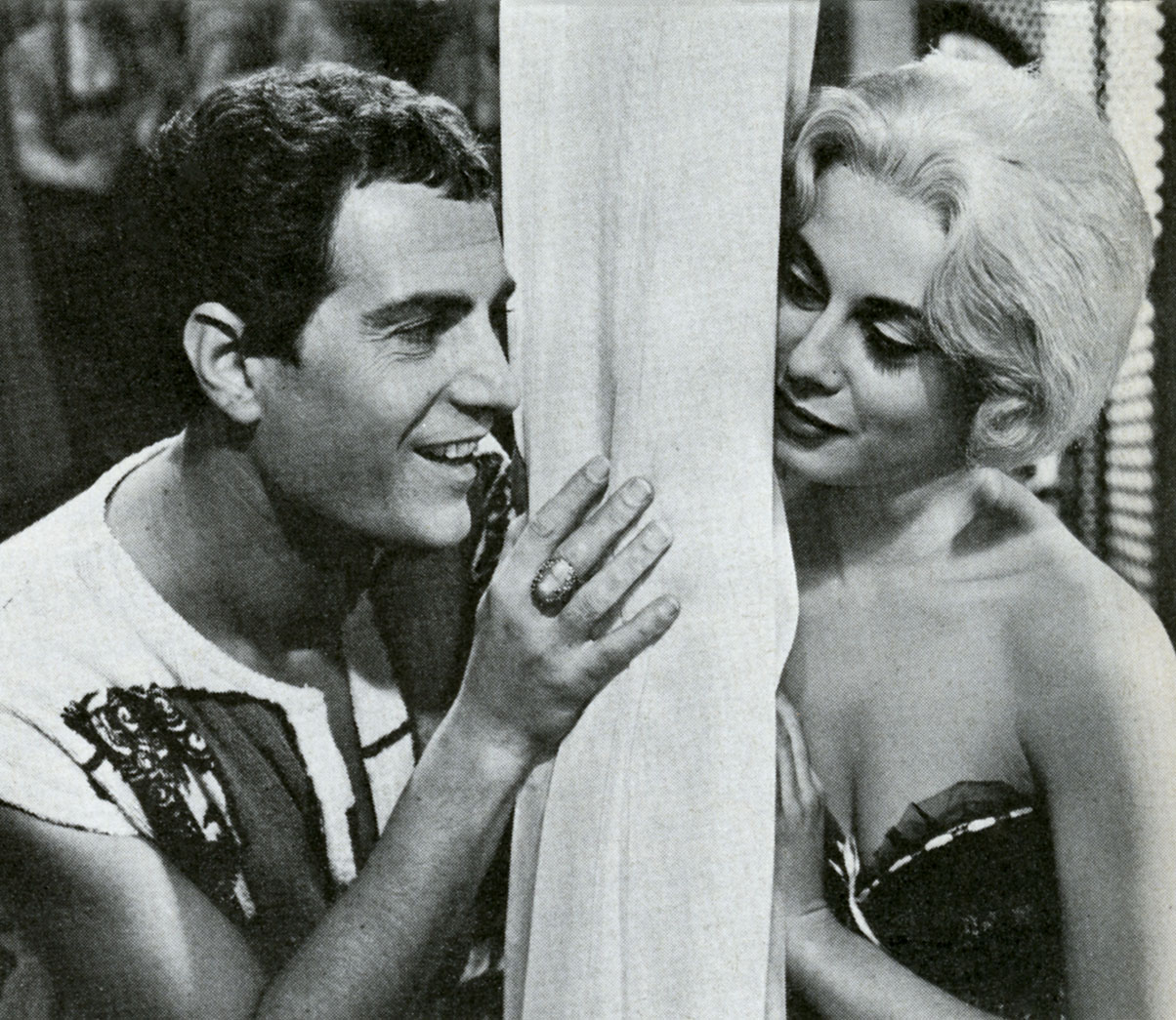 foto di scena film L'impiegato